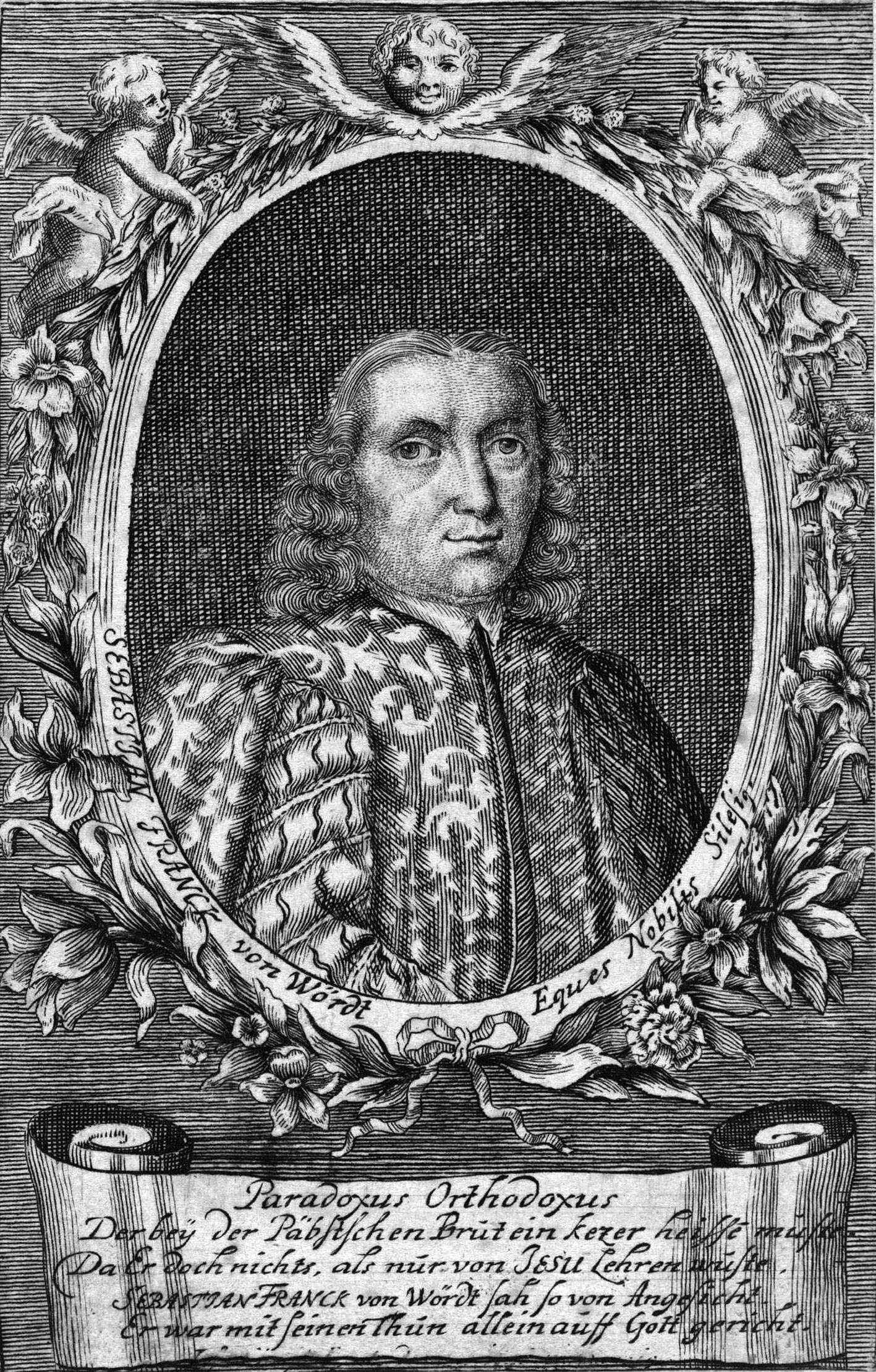 Abbild, das vermutlich Sebastian Franck zeigt.